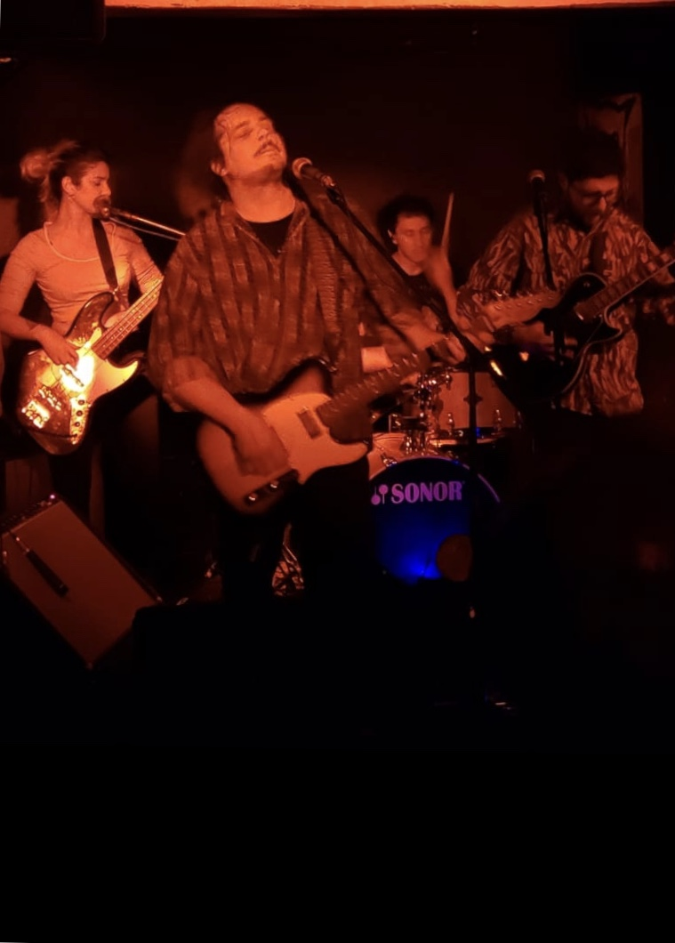 Impalas 2018